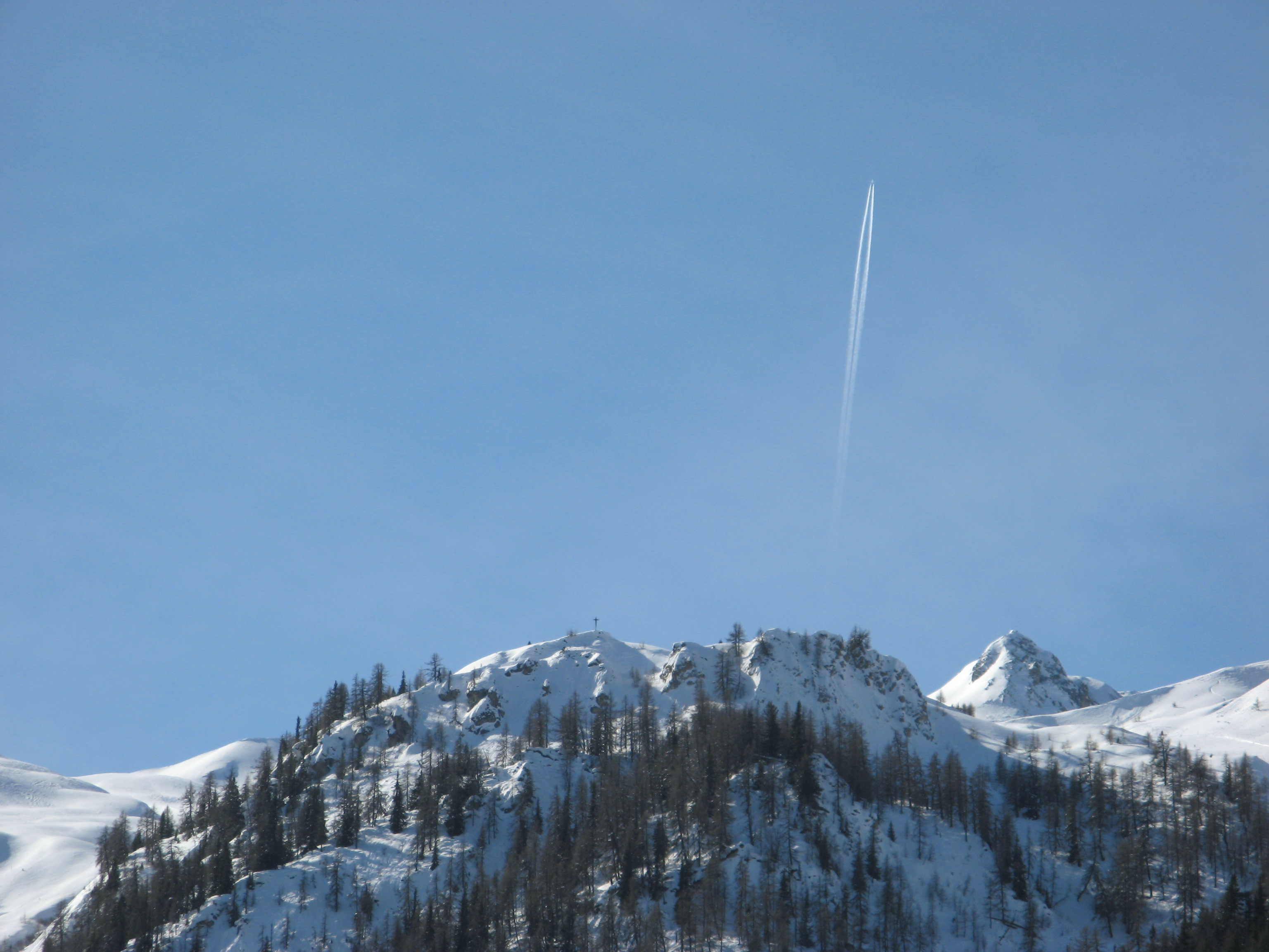 Croix du Six Blanc, in Bagnes, Valais, Switzerland.